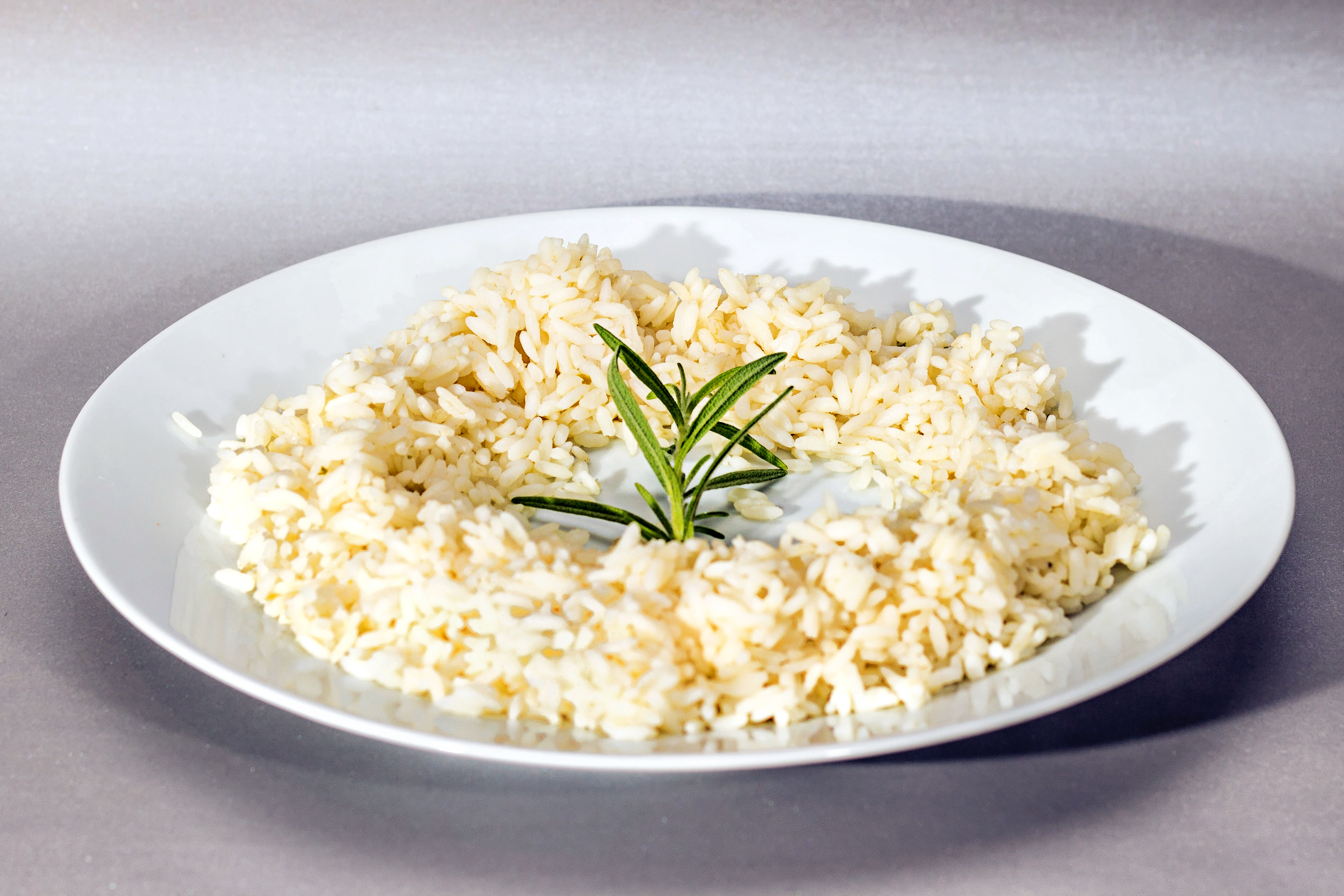 Reisring